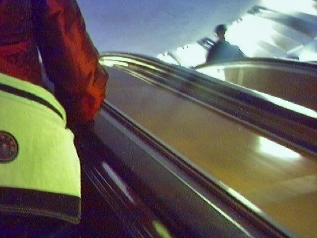 Мобилография № 1Из Арт-проекта "Мобилография" (фотография сделанная мобильным телефоном motorola c650)